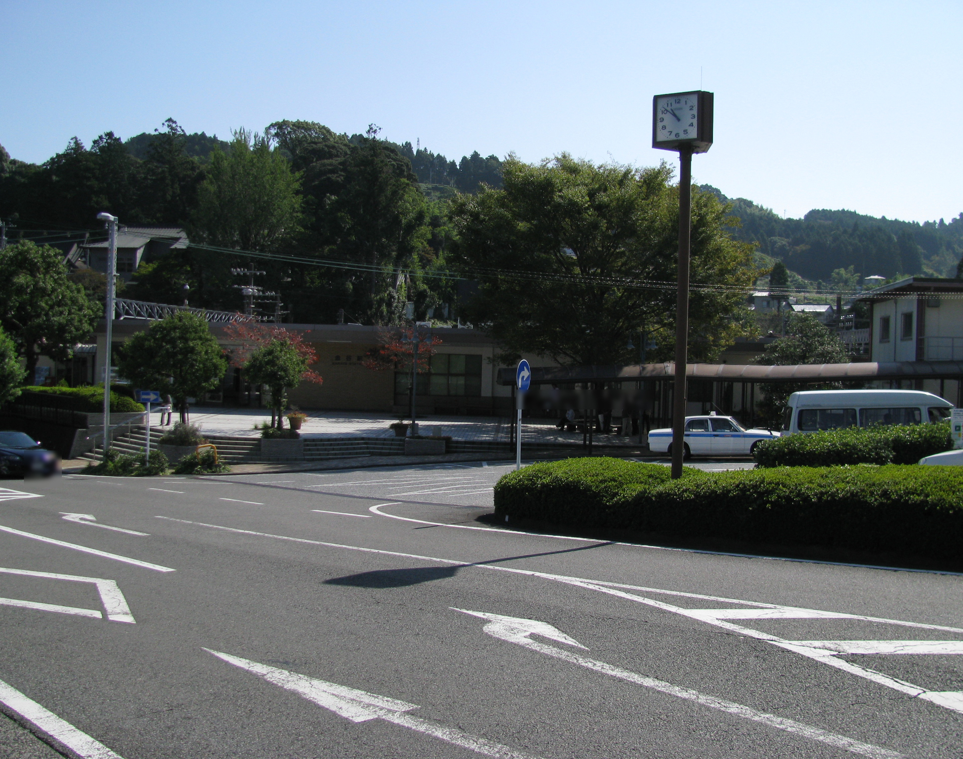 東海道本線金谷駅